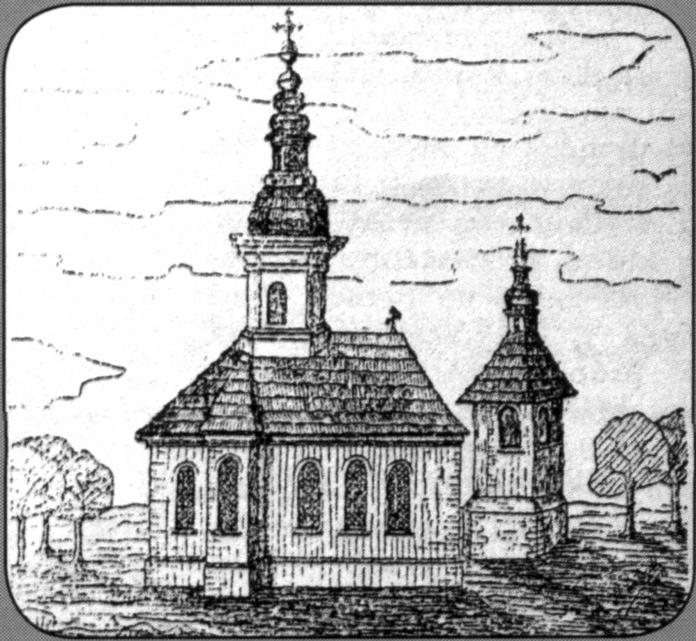 Panorama baryczkowska, kościół św. Stanisława, Skaryszew (now Warsaw)